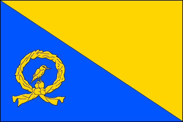 Vlajka obce Točník